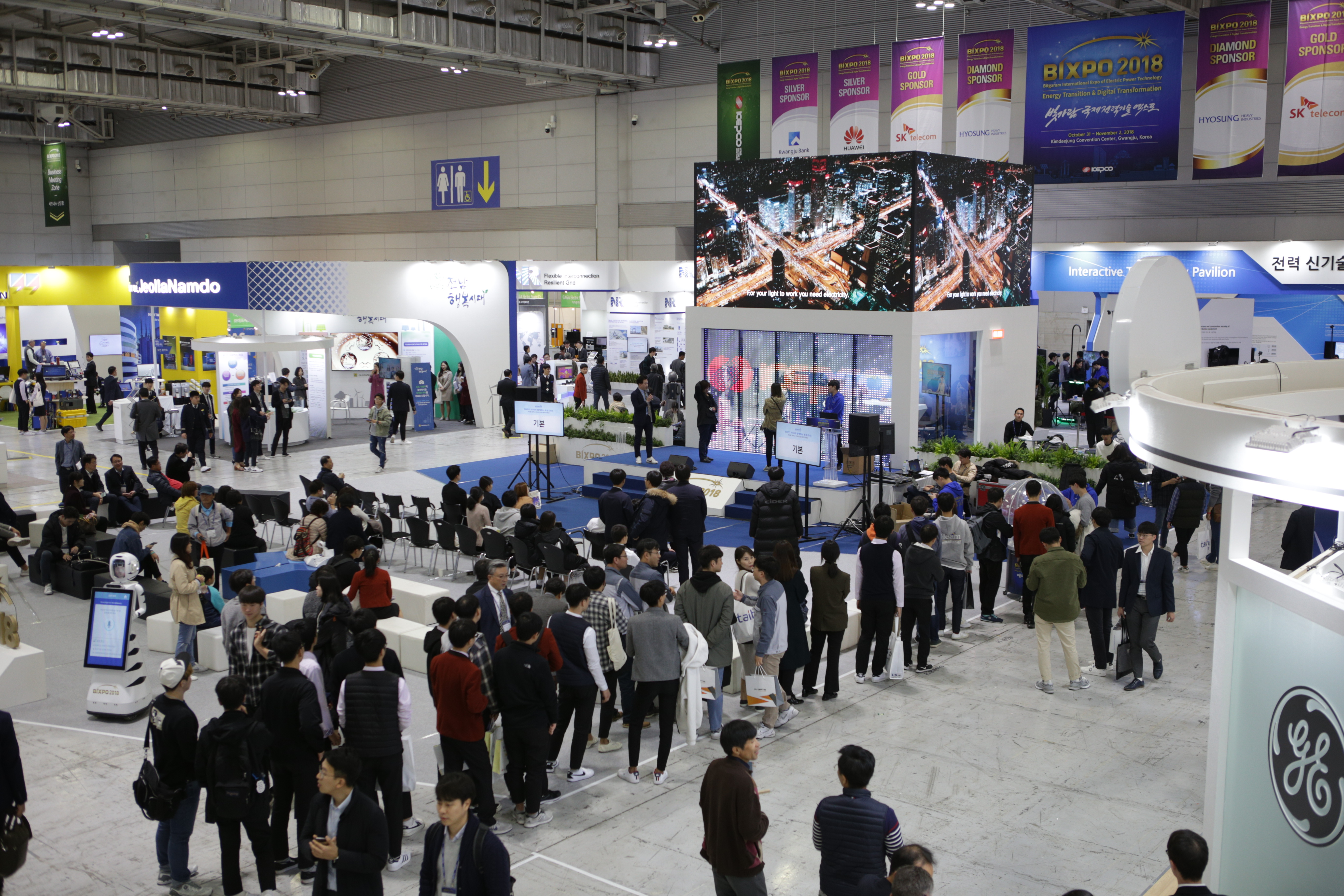 빅스포 현장 사진